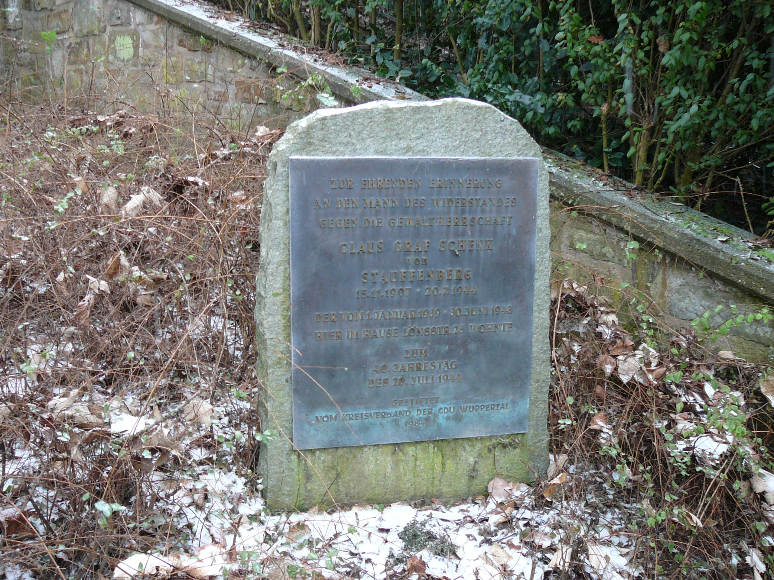 Lönsstraße, Wuppertal